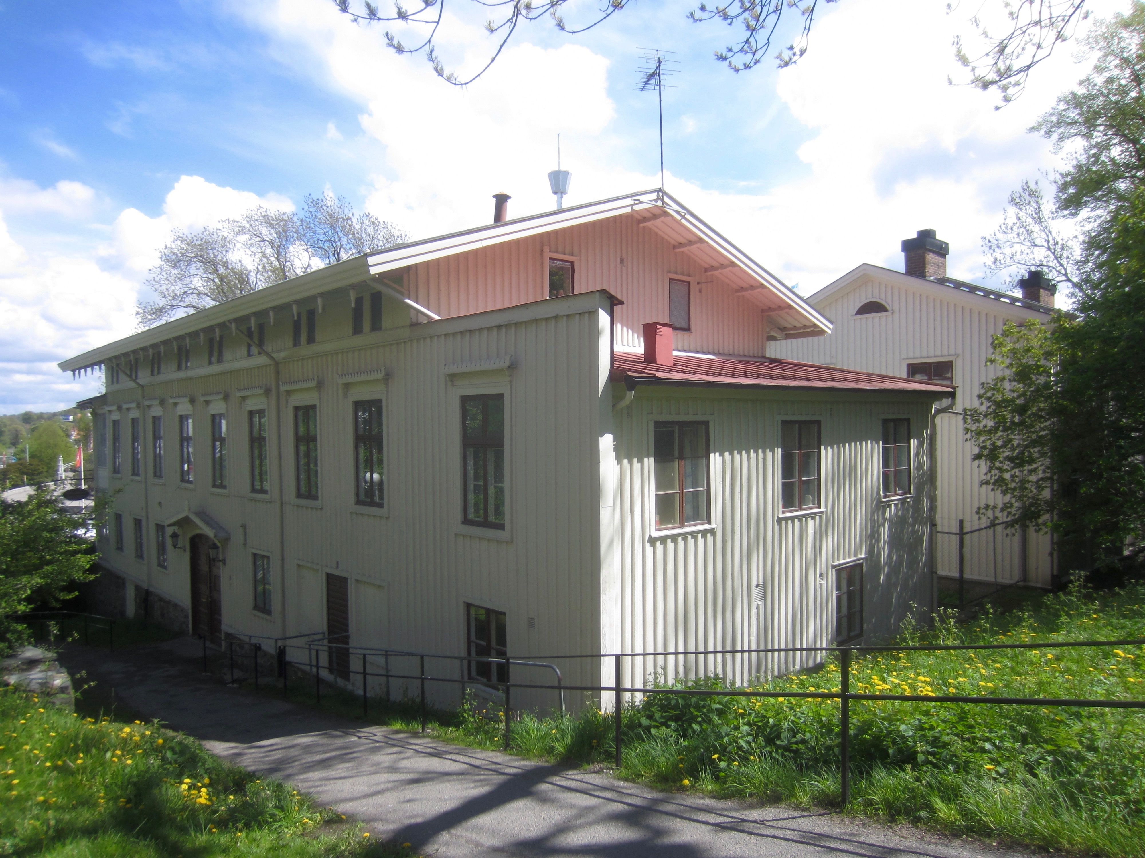 Johannebergs landeri, 2015.